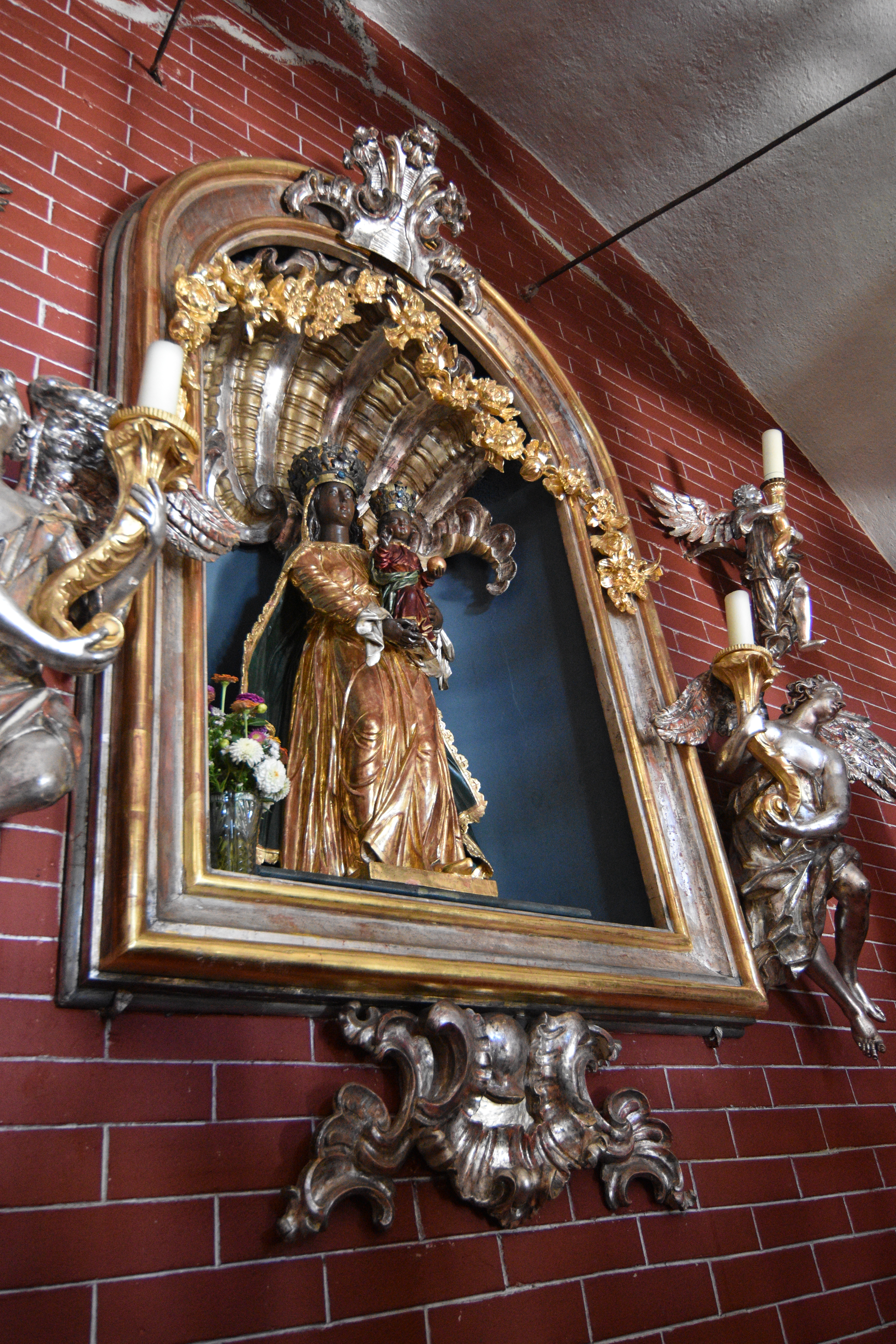 Loretokirche Gutenberg an der Raabklamm Interior